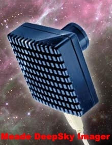 CCD Camera: Meade DeepSky Imager; zelf gemaakt